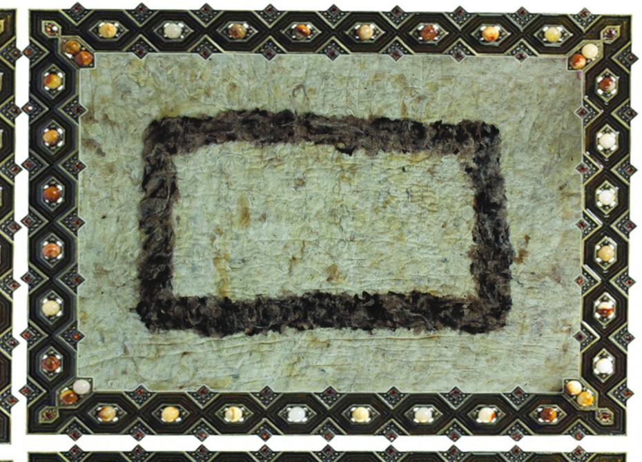 Keçəçilik